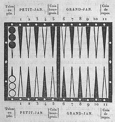 Description du tablier de trictrac. Provenance "traité complet du jeu de trictrac", guiton 1822. Enregistré par Ph. Lalanne